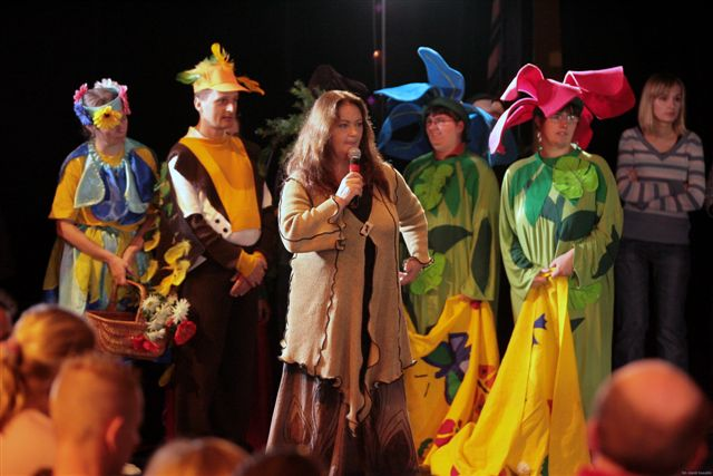 Anna Dymna podczas "Albertiany" z aktorami "Radwanka".